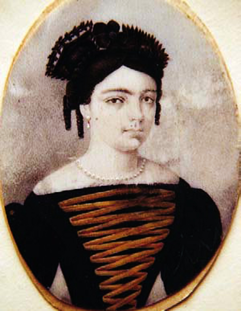 Francisca Zubiaga (1803-1835), esposa de Agustin Gamarra